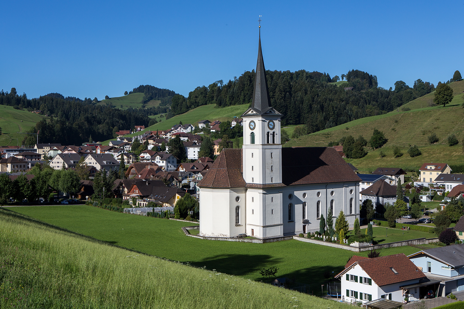 Blick auf Hergiswil (LU)